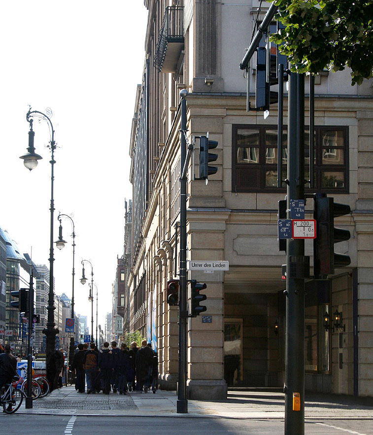 Straßenecke Friedrichstraße und Unter den Linden in Berlin.